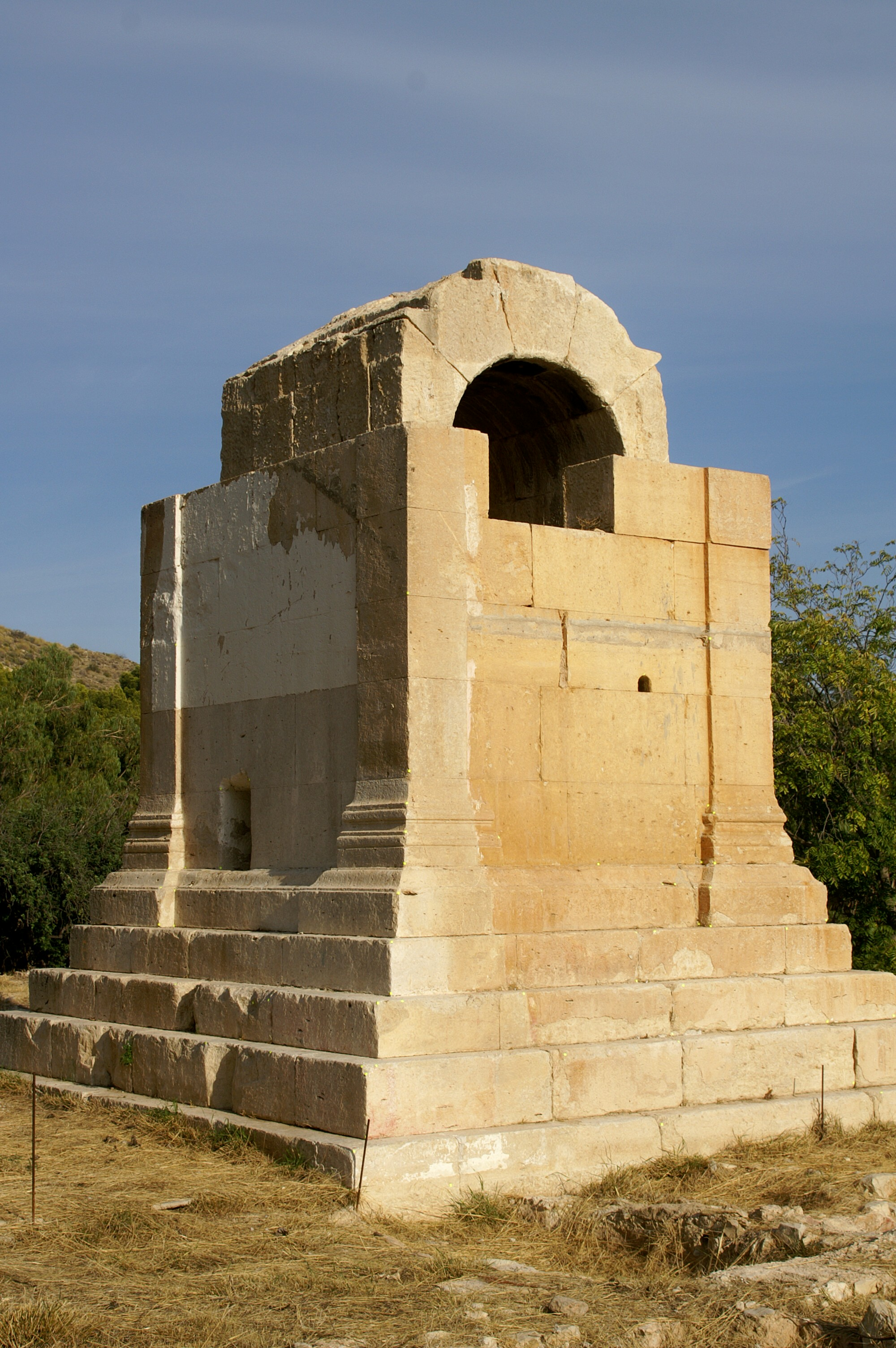 Vista completa de la torre d'Hèrcules, abans Torre de Sant Josep (la Vila Joiosa, la Marina Baixa, País Valencià)